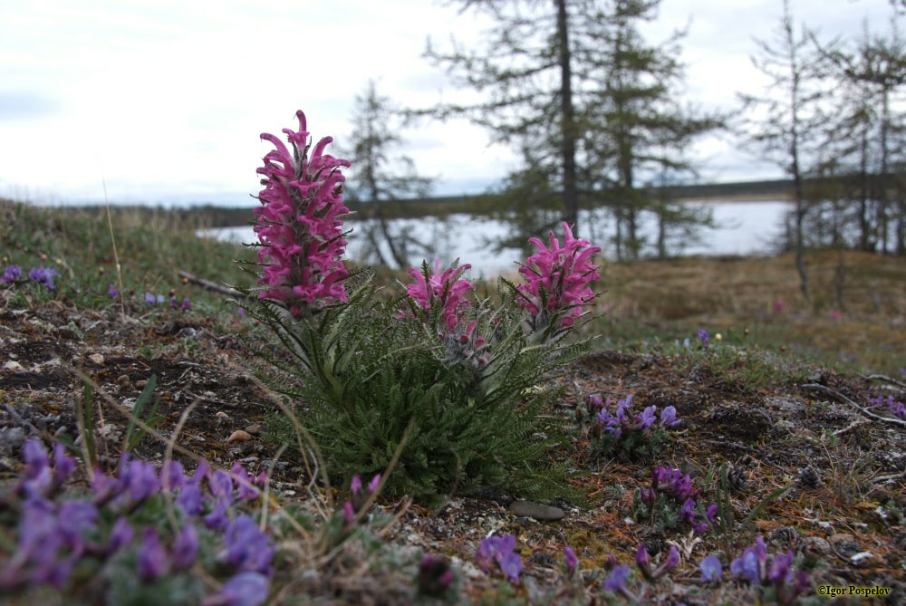 Мытник лисохвостовидный (Pedicularis alopecuroides) в Таймырском заповеднике